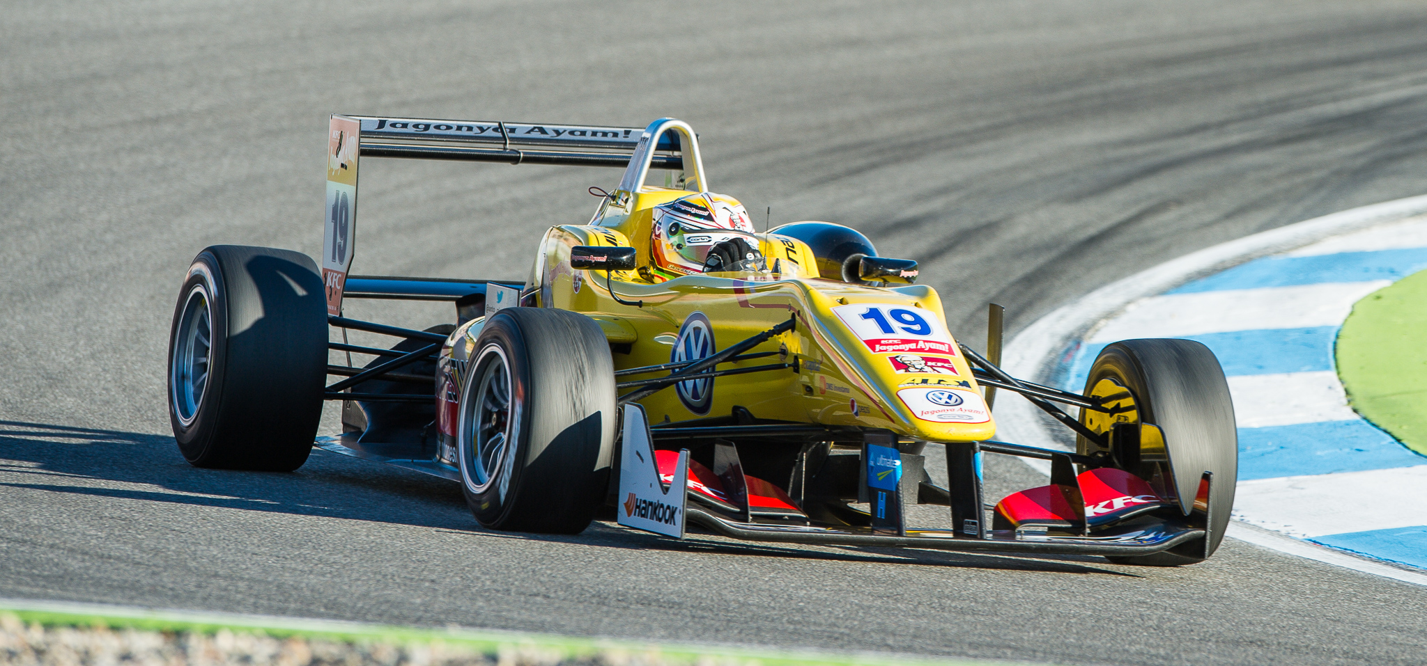 Antonio Giovinazzi,DTM,Dallara F312,Deutsche Tourenwagen Masters,F3 FIA European Championship,FIA Formel 3 Europameisterschaft,Hockenheimring,Jagonya Ayam with Carlin,Motorsport,Volkswagen